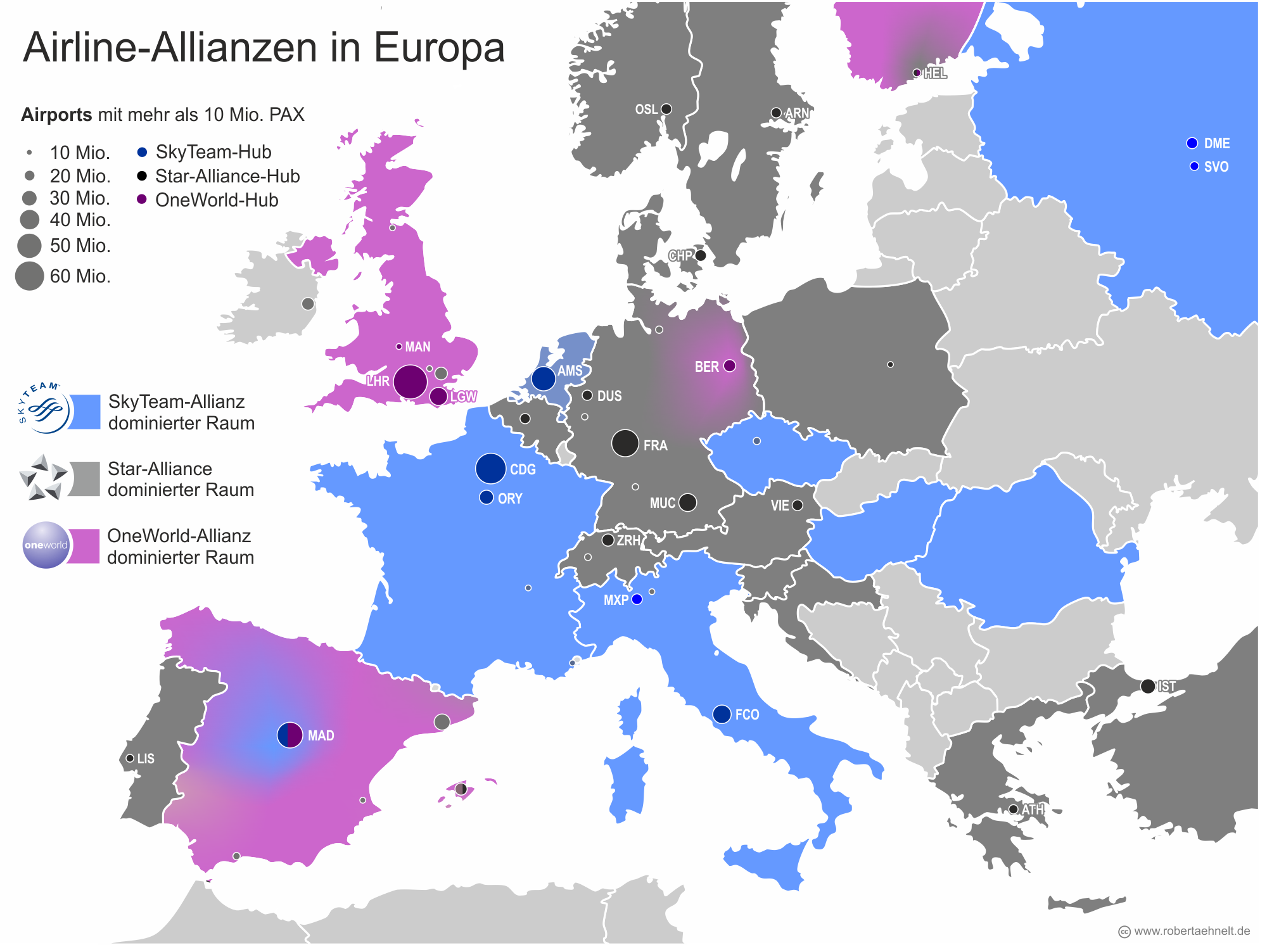 Airline-Allianzen in Europa